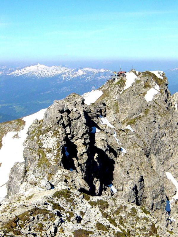 Im Hindelanger Klettersteig, am Gipfel des Westlichen Wengenkopfs (2235 m) mit Blick nach Westen zum Nebelhorn (2224 m).